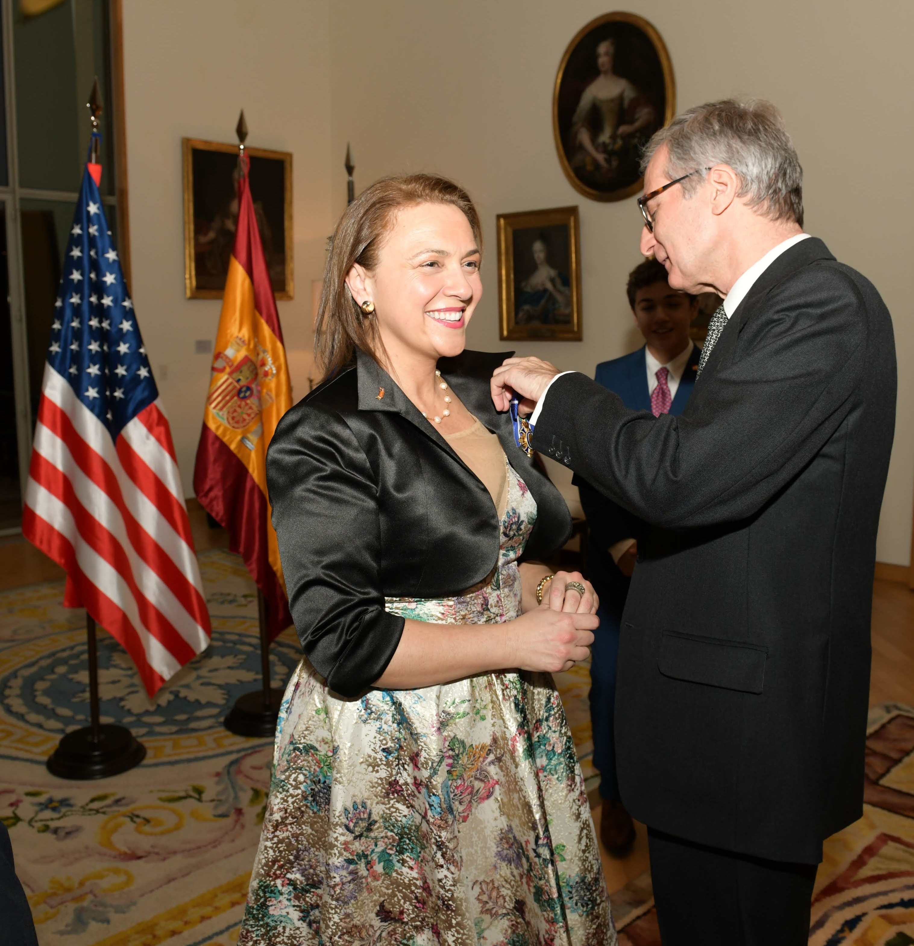 Teresa Valcarce recibiendo la Encomienda de la Orden del Merito Civil de manos del Embajador de España en Washington DC, Santiago Cabanas